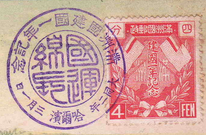 満州国が1933年に「建国1周年」として発行した記念切手のうちの4分切手。押されている記念印は初日印であり、ハルビンで押印されたものである